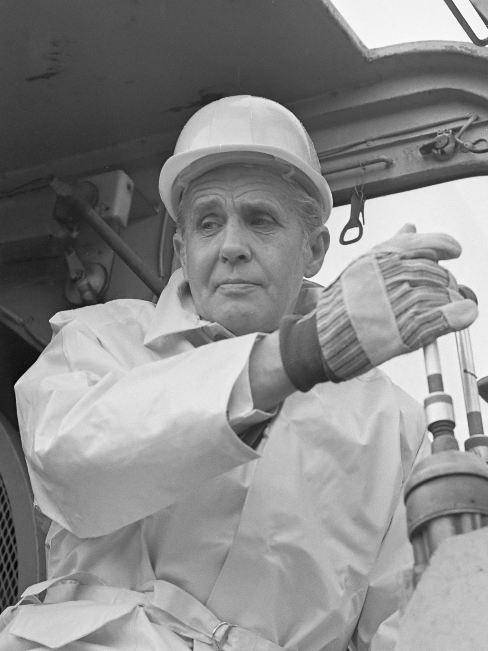 Hoofdcommissaris van politie P. A. Jong slaat eerste paal voor combinatie gebouw Politie, Brandweer en GGD in Amsterdam Buitenveldert 21 oktober 1974